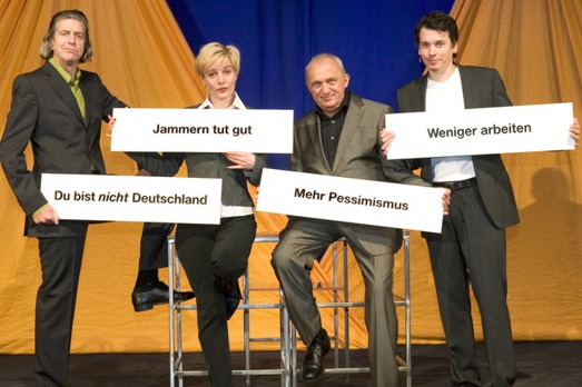 Das Foto Zeigt den Kabarettisten Gert Kießling. Offizielles Ensemble Foto der Distel Homepage zur Produktion nullrunde siehe auch homepage Distel